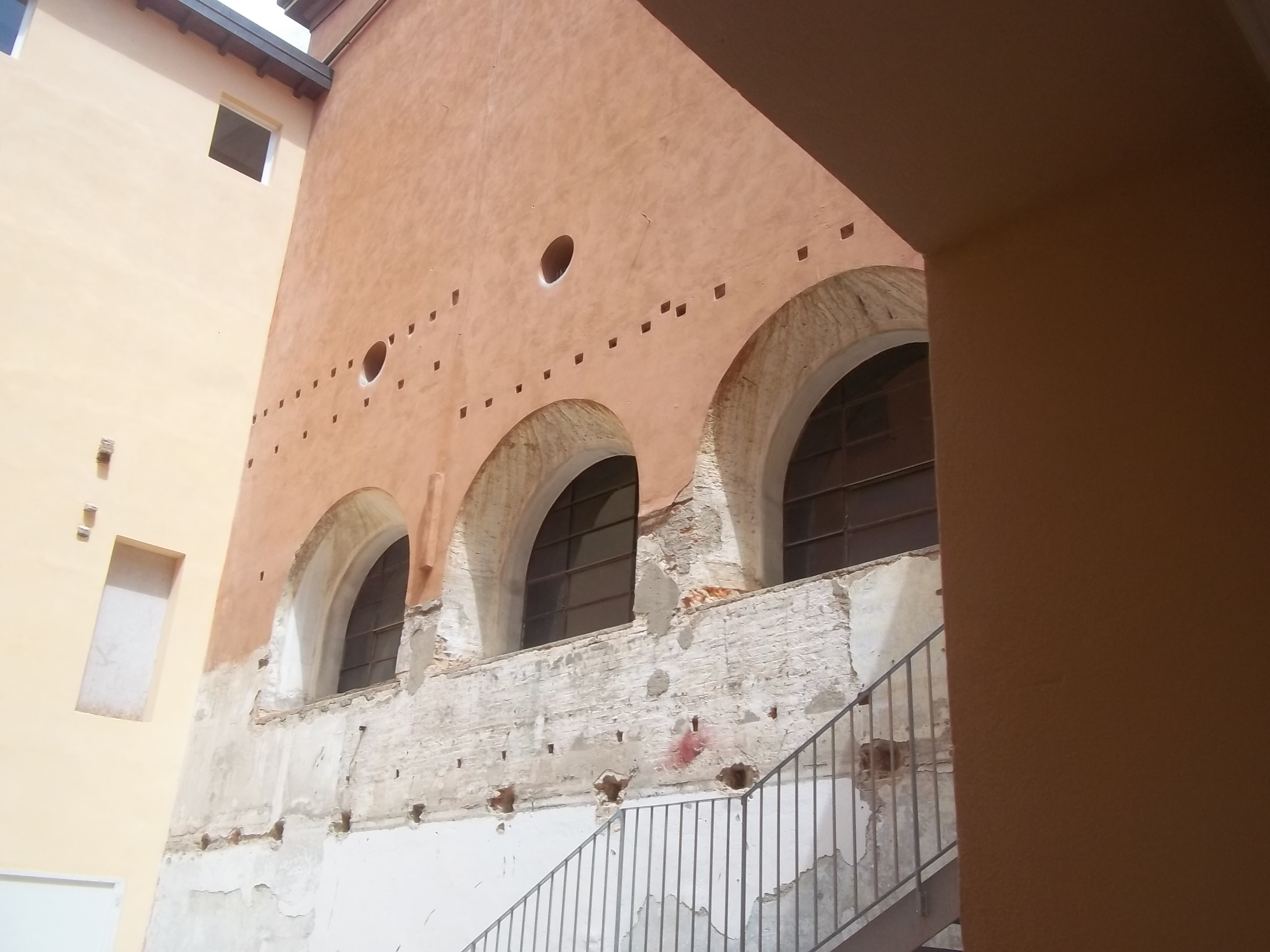 חצר בית הכנסת